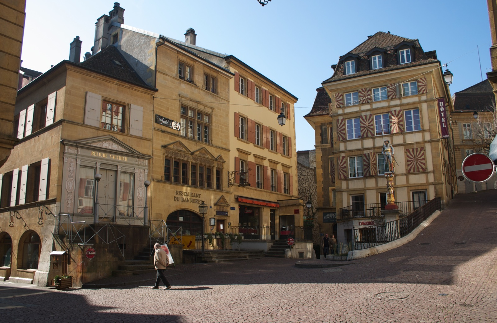 Fontaine du Banneret à Neuchâtel